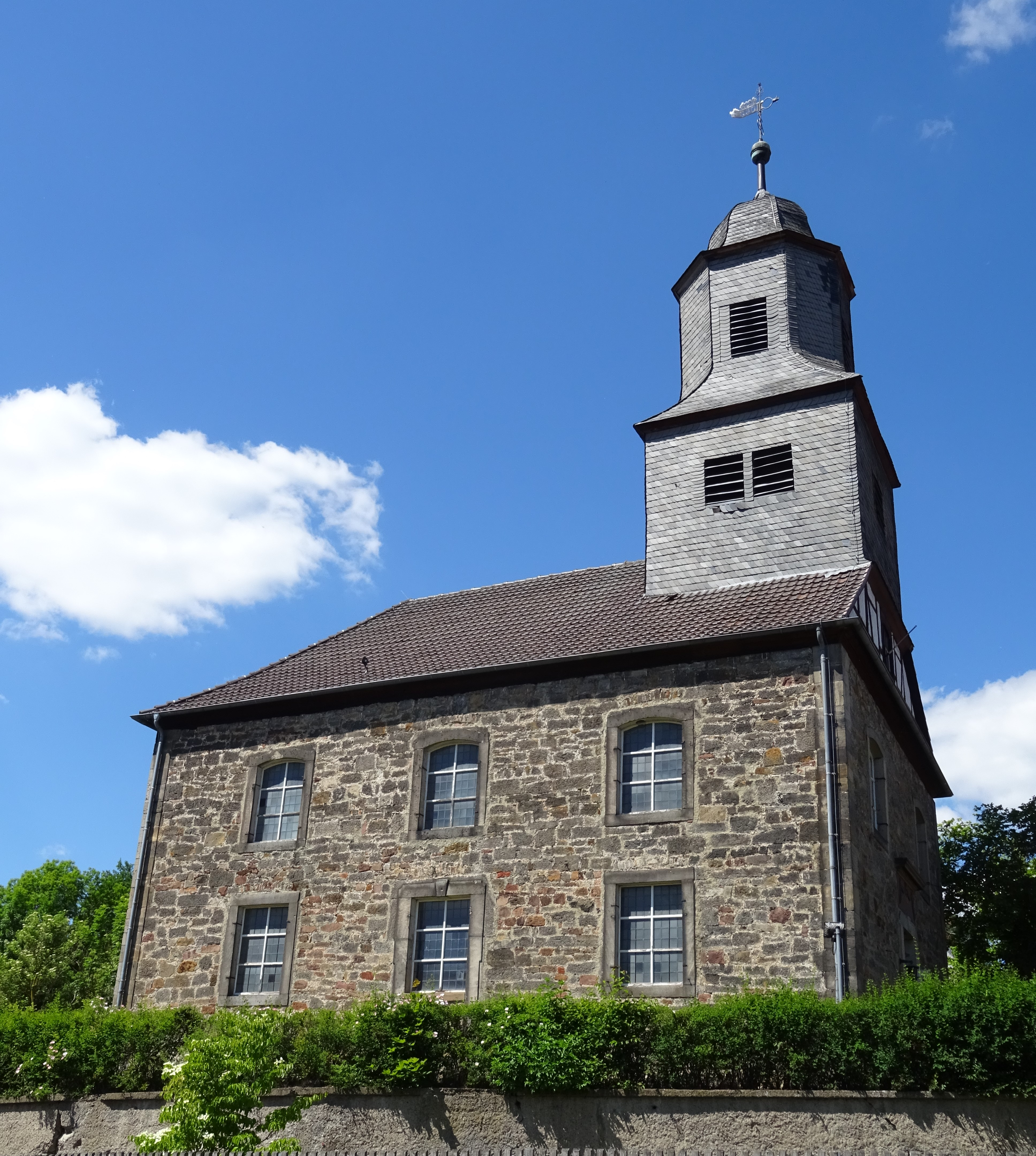 Südseite